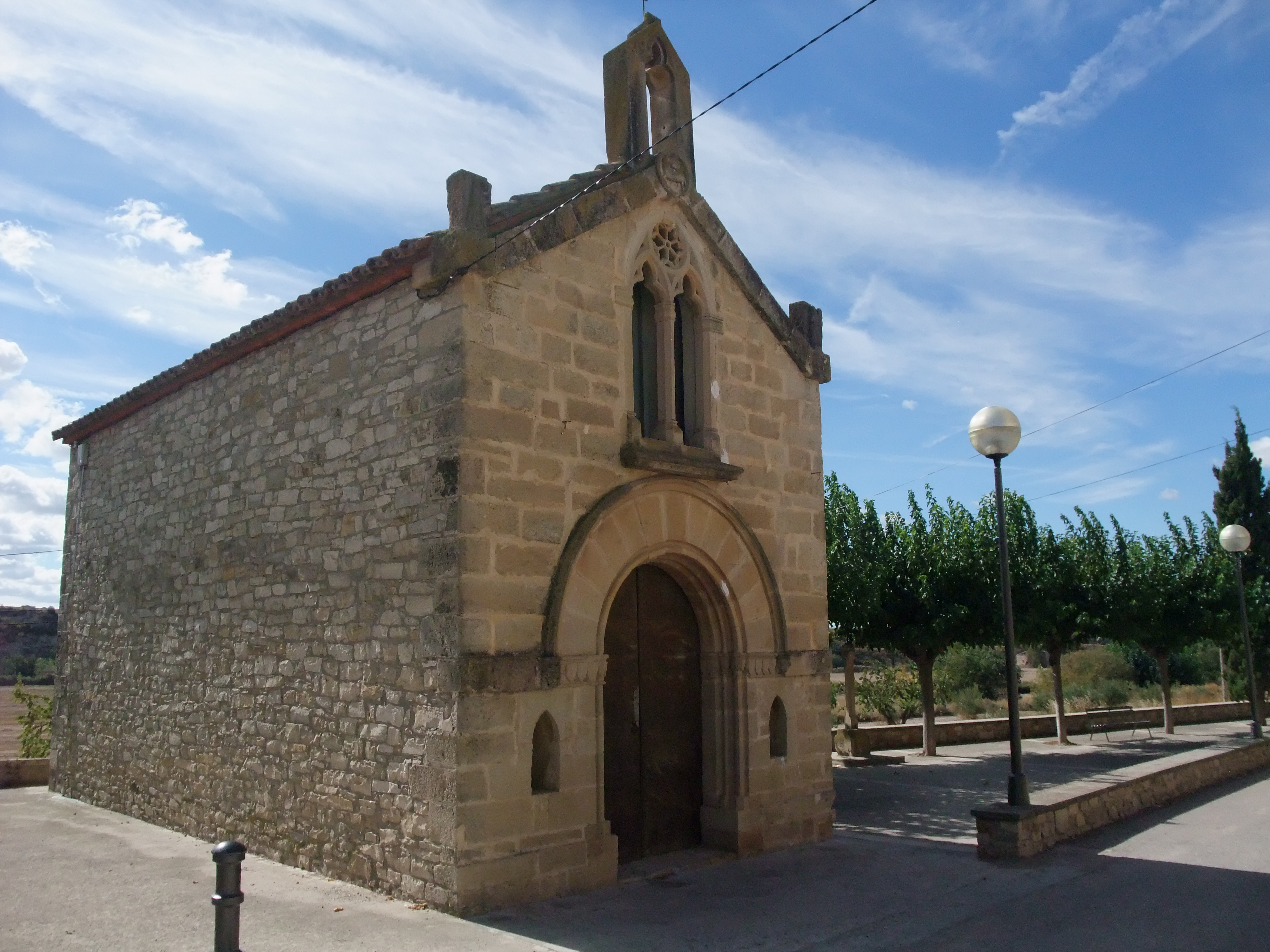 Ermita del Pedregal